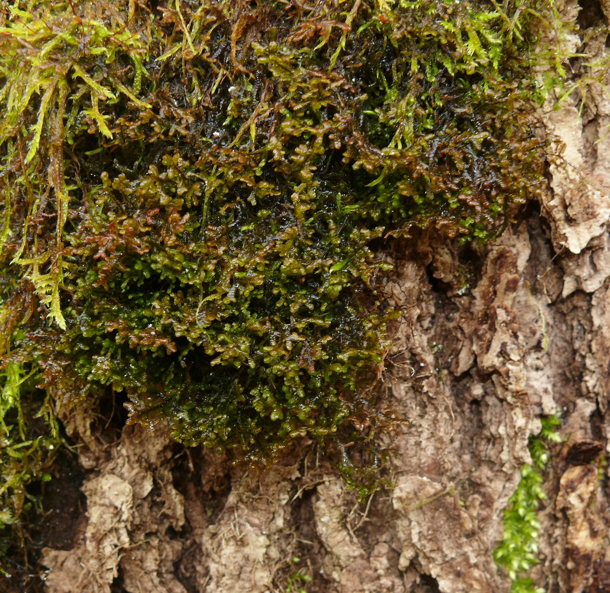 Frullania tamarisci, Schwäbisch-Fränkische Waldberge, Deutschland